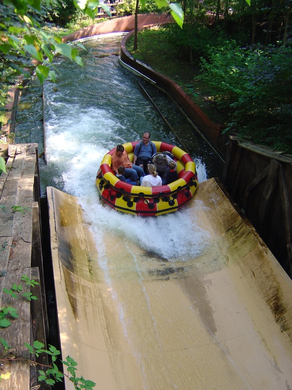 L'Oxygénarium, Parc Astérix, France